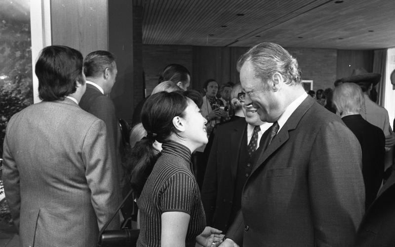 Bundeskanzler Willy Brandt empfängt Filmschauspieler